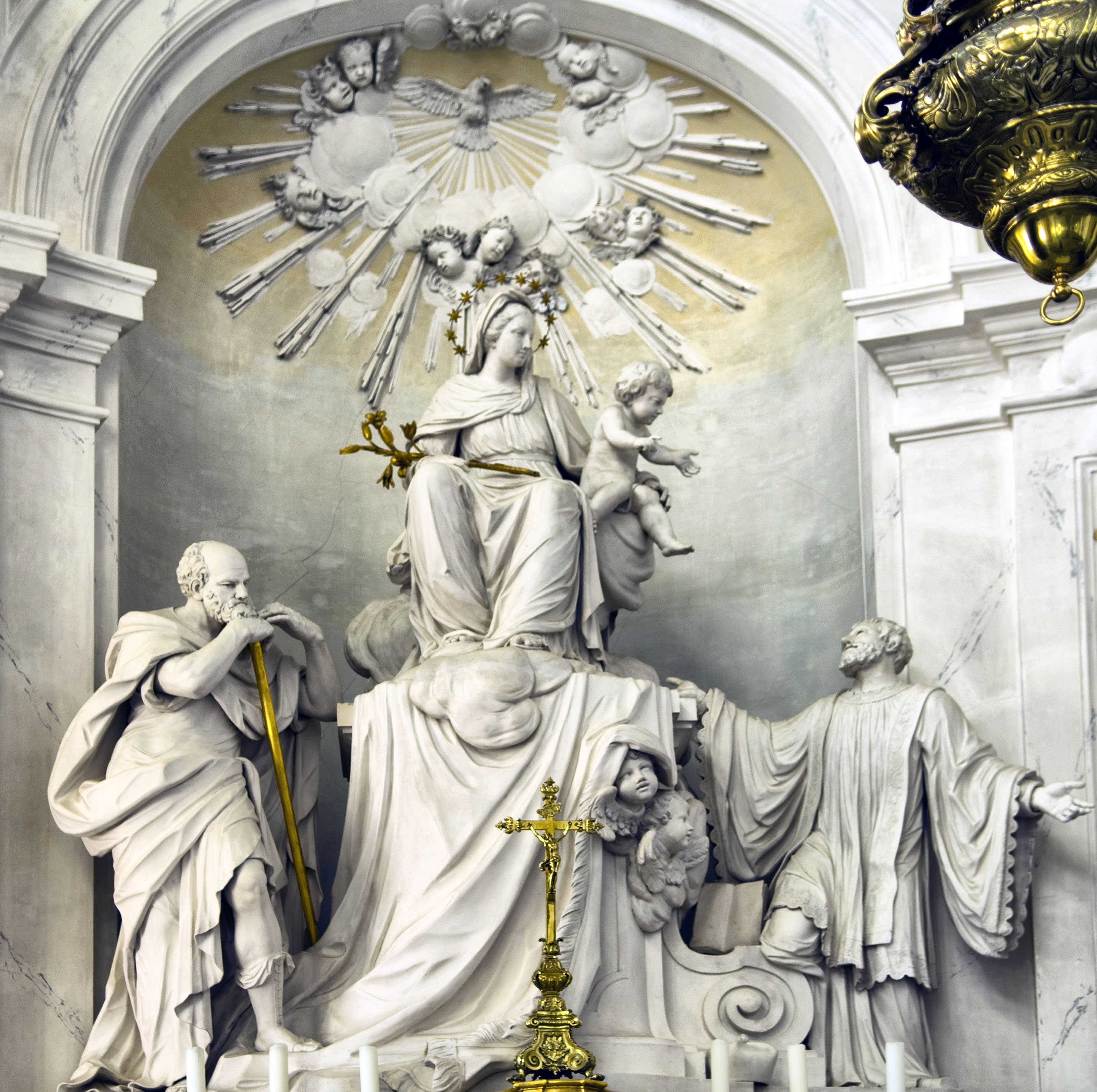 Santa Conversatione aus Stucco Lustro - Schloßkapelle Hubertusburg